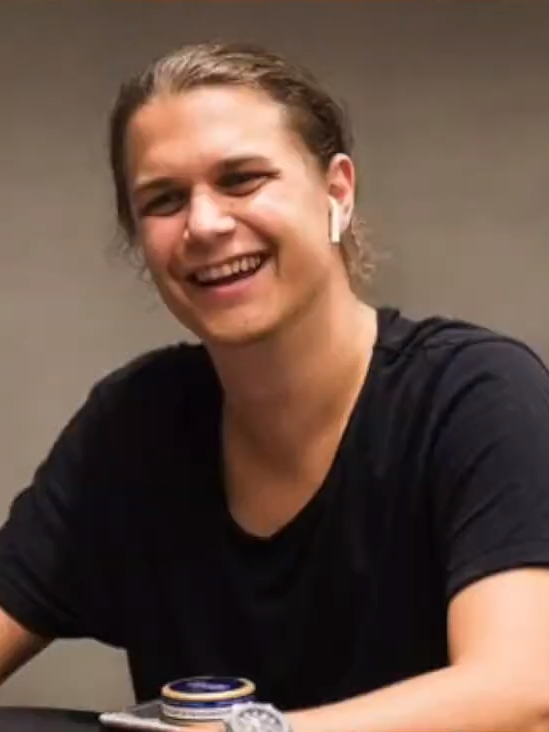 Niklas Åstedt beim High Roller der EPT Barcelona